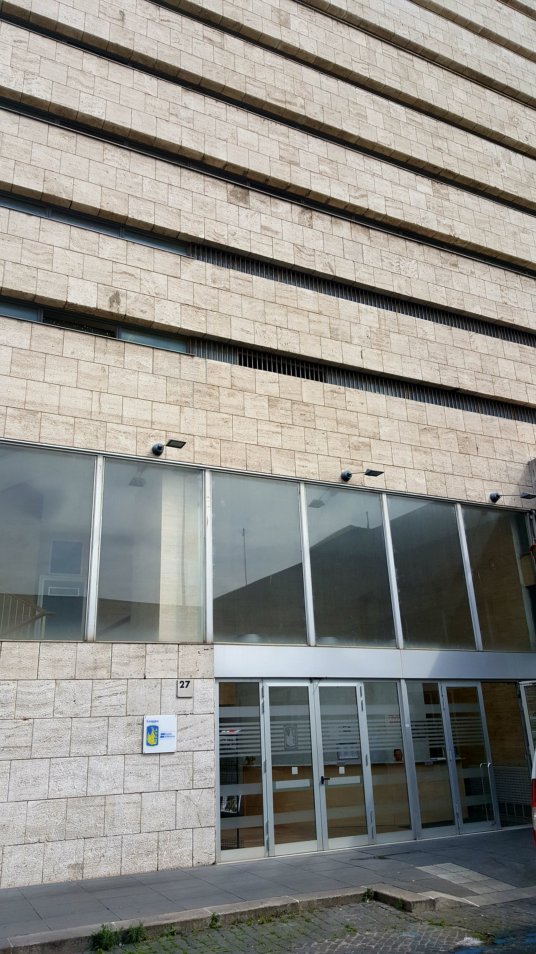 Sede della società Stretto di Messina SpA a Via Marsala n. 27, Roma